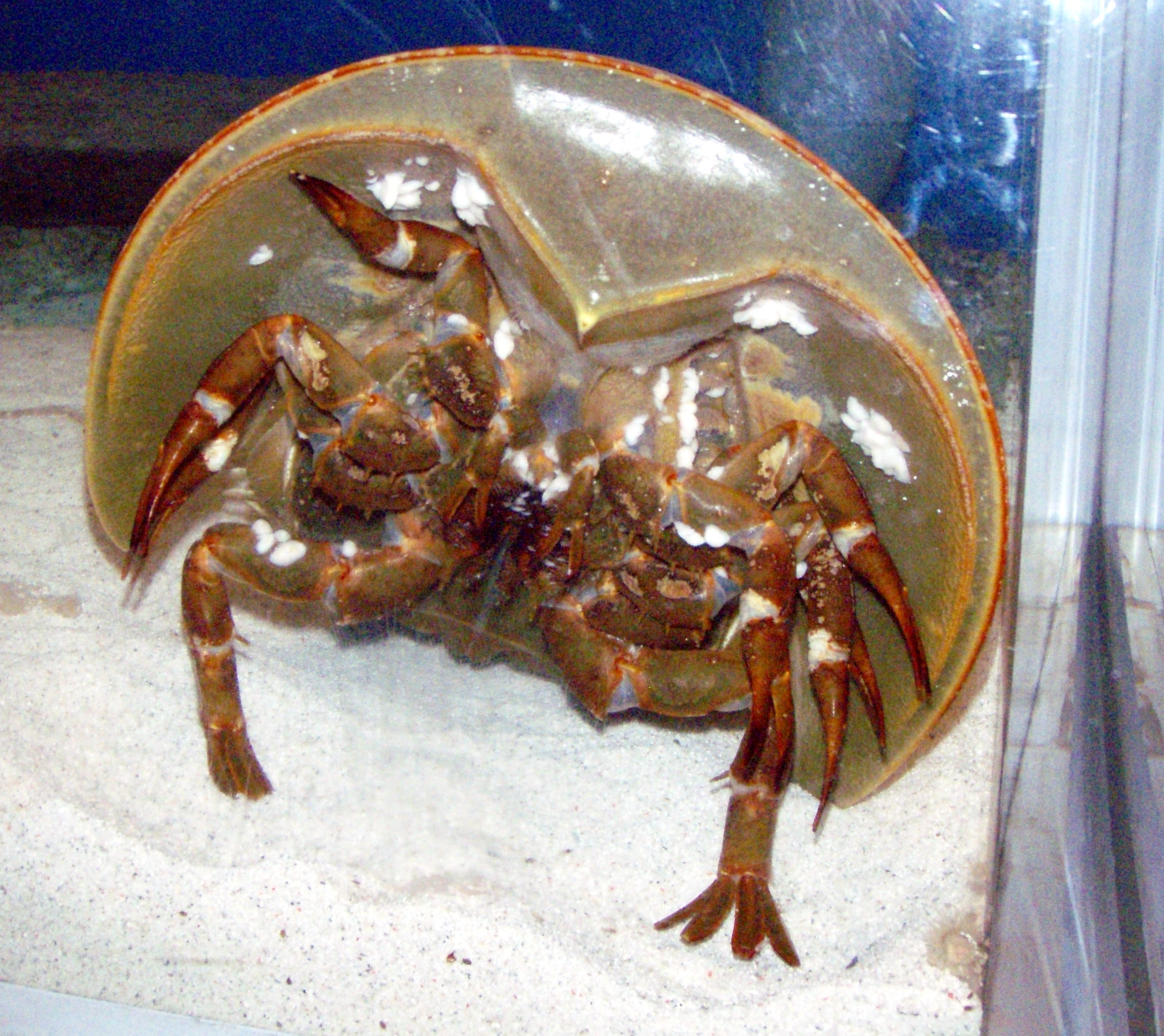 カブトガニの腹部と後脚